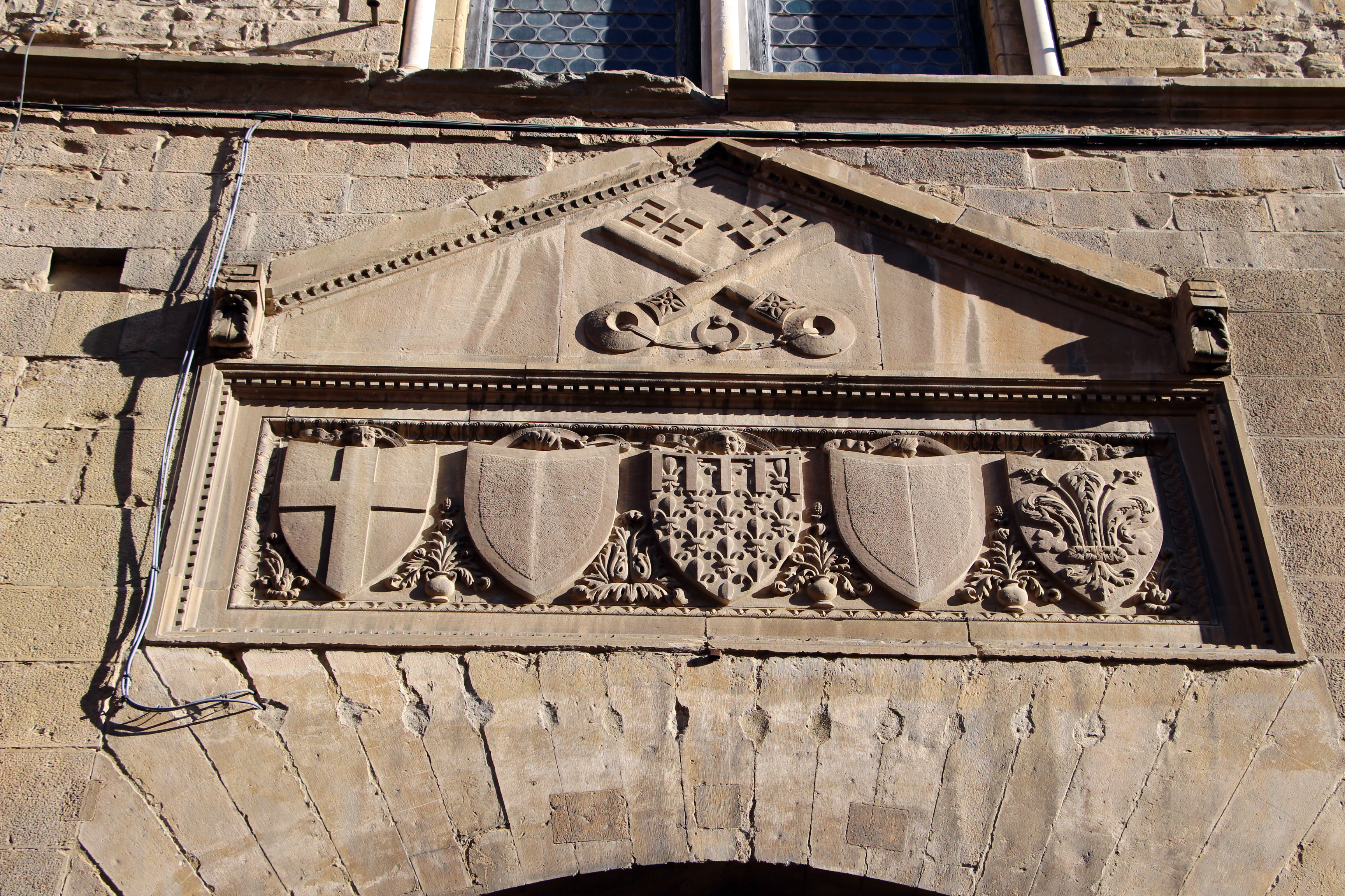 Bernardino poccetti, nozze di cana, 1604, 01.JPG